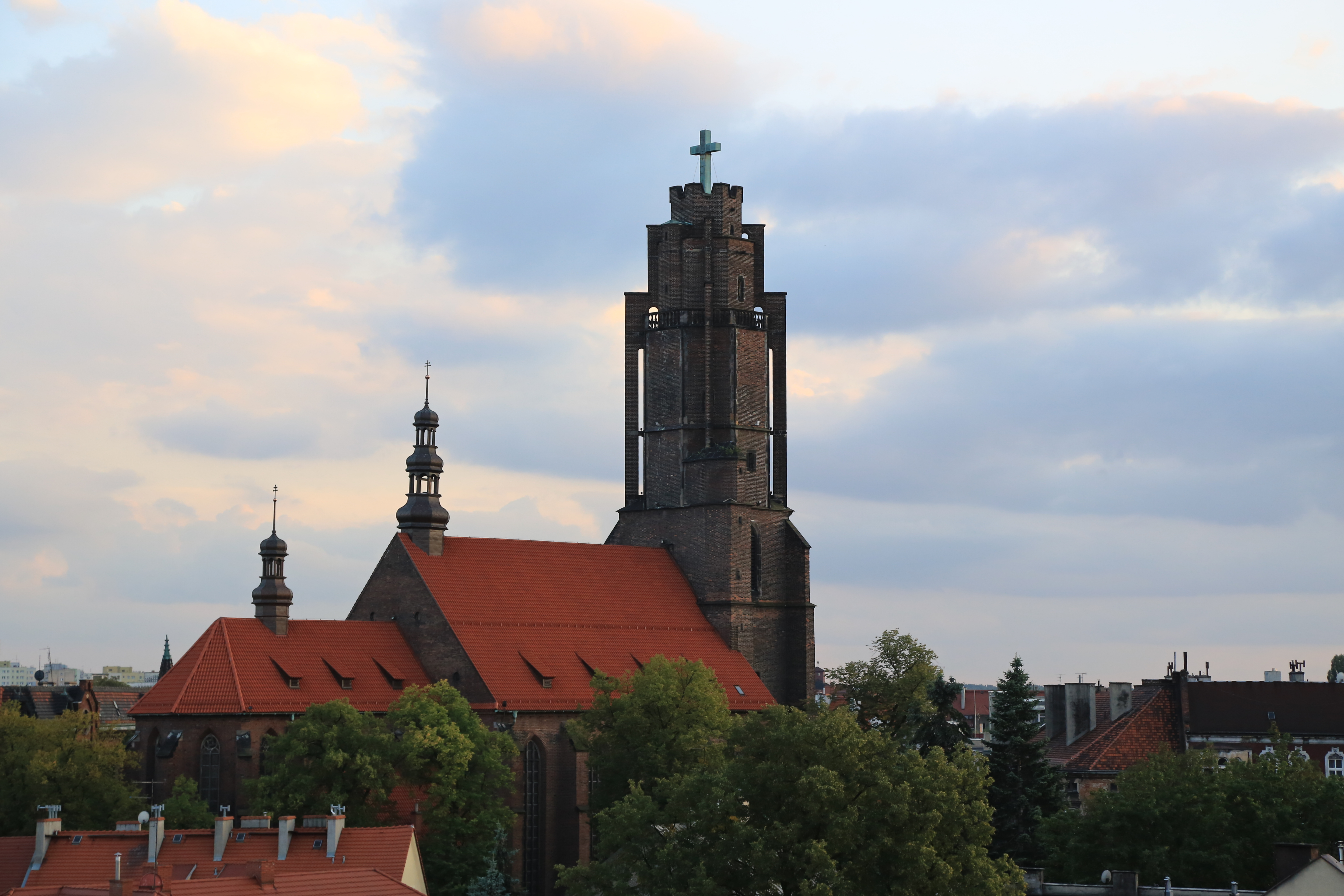 Wieczorem w Gliwicach